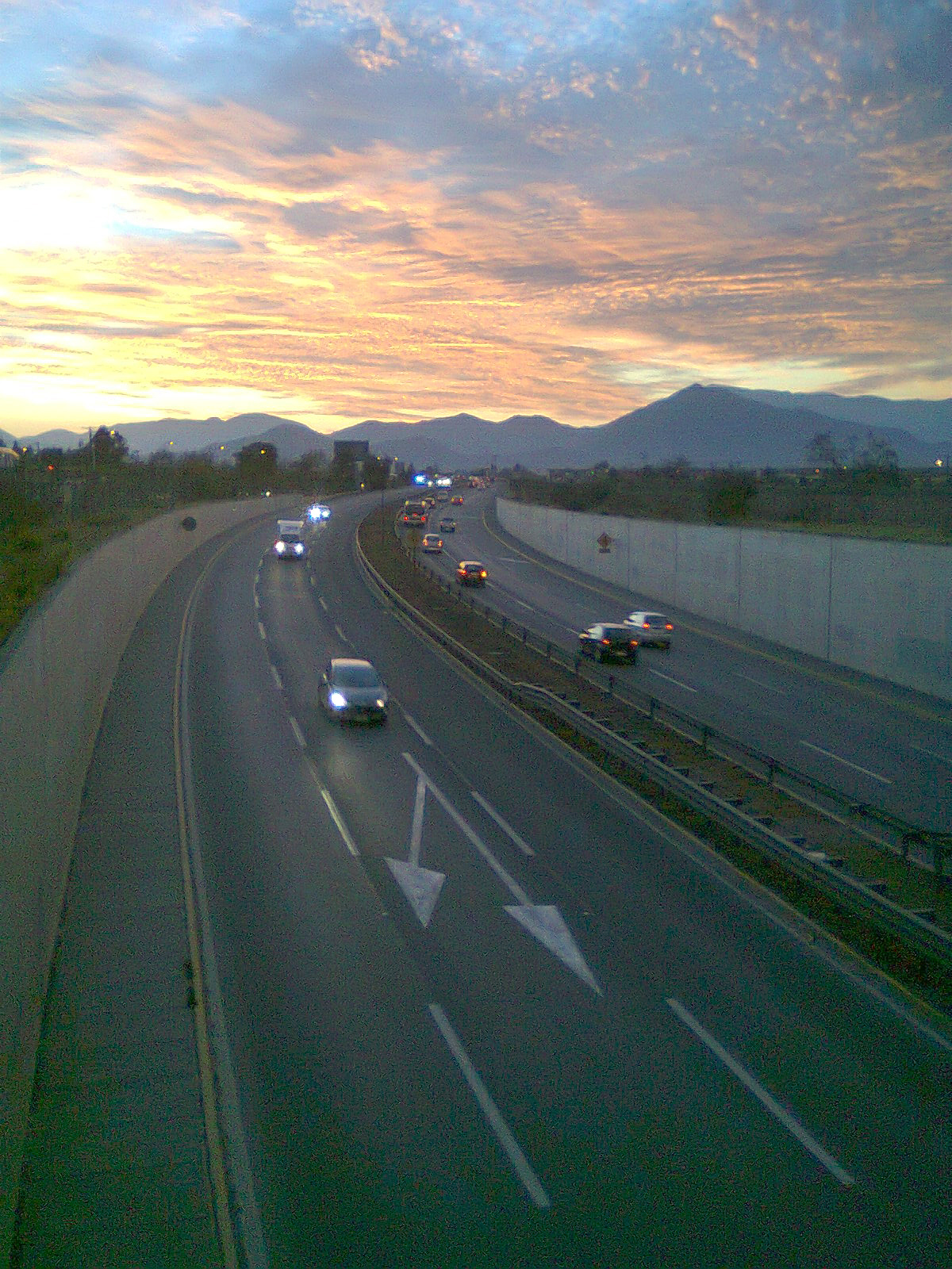 La Autopista del Sol pasando bajo la avenida Pajaritos, en la comuna de Maipú. Fotografía tomada cerca de la Quinta Las Rosas. Santiago de Chile, 23 de septiembre de 2011.